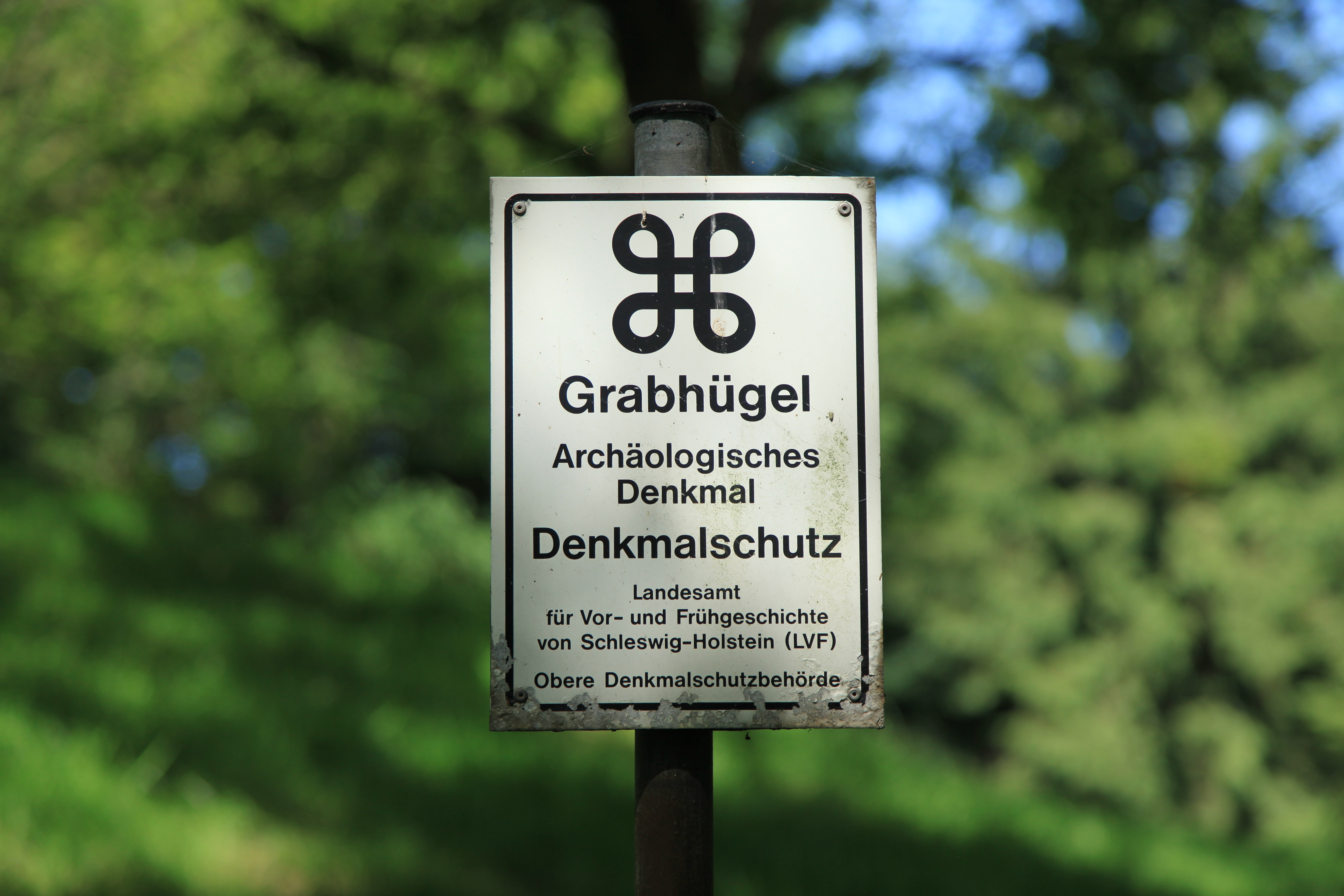 Grabhügel auf dem Königshügel an der Brekendorfer Landstraße in [Selk